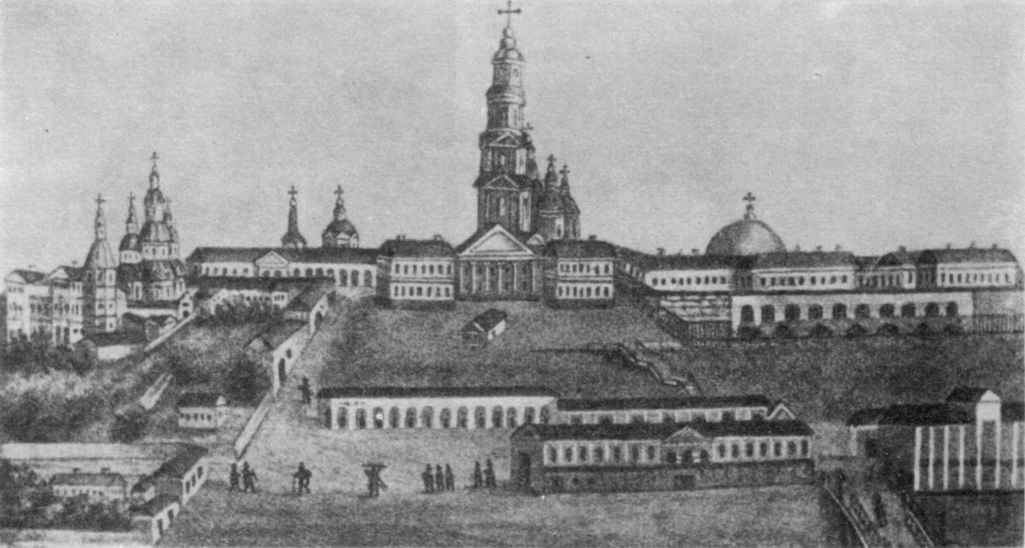 Гравюра 1840-х годов, изображающая вид на Университетскую горку из-за Лопани. По центру виден Успенский собор, слева Покровский монастырь, справа - здания Харьковского Императорского университета и университетской церкви. Внизу располагается Сергиевская площадь, от неё к Университетской улице поднимается вверх Купеческий спуск.